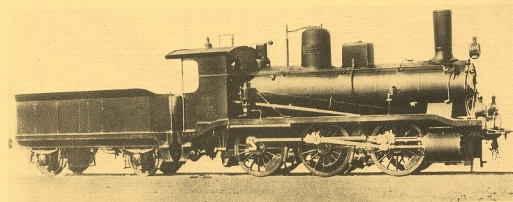 Locomotiva gruppo 350 bis della Rete Adriatica con tender a due assi, poco prima della statalizzazione delle ferrovie.